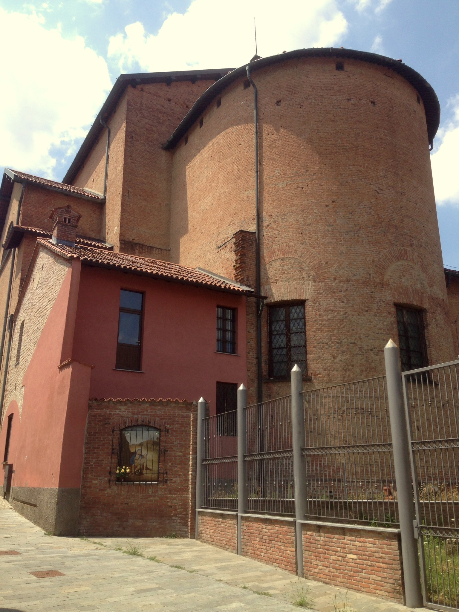 Nerviano - Parrocchia di Santo Stefano - Via San Fermo